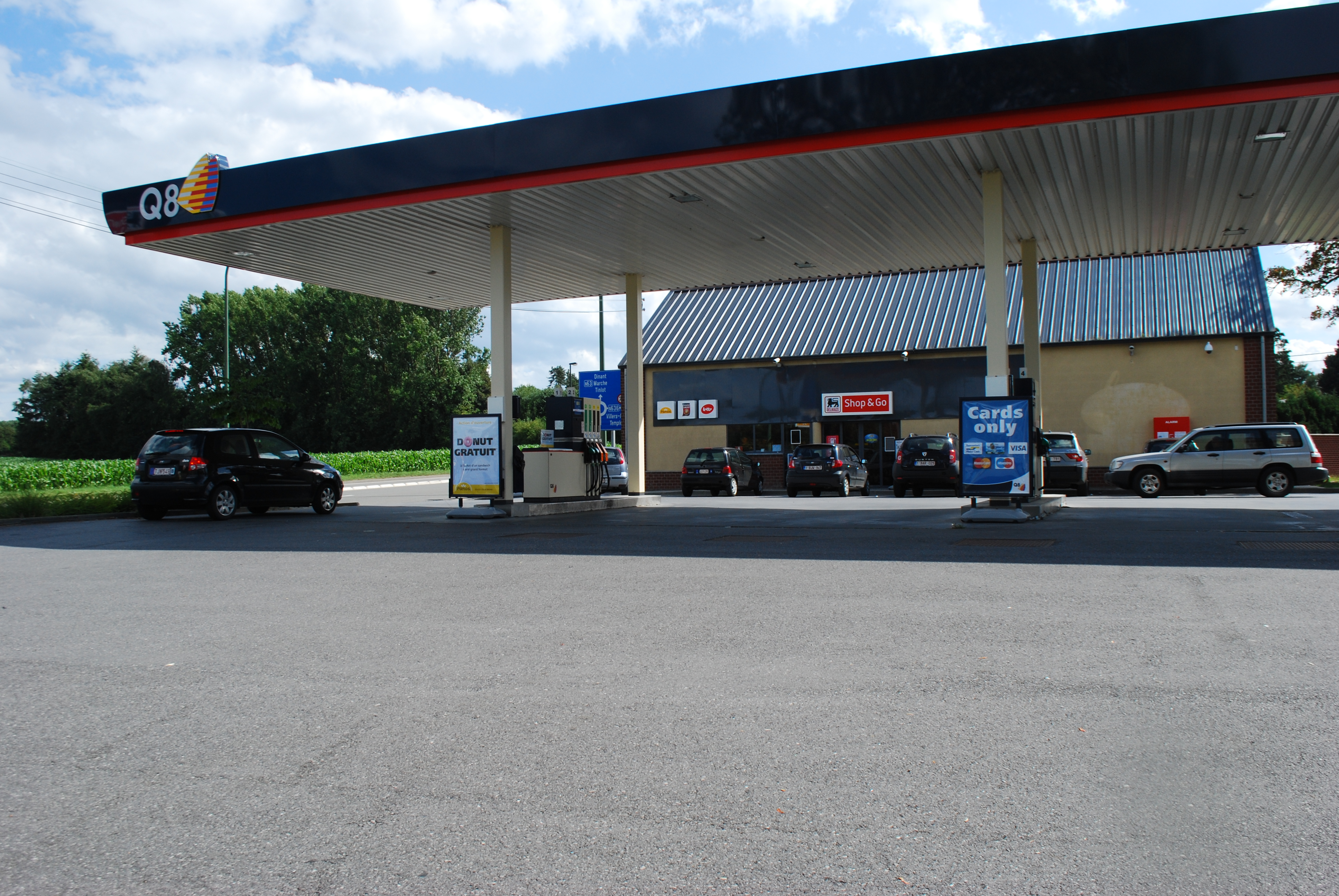 Station-service Q8, au rond-point des Quatre-Bras à Nandrin, sur la RN63.